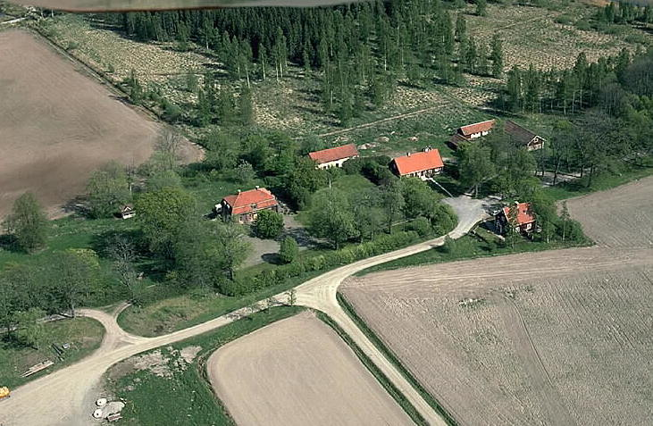 Bondgård. Motiv: Kägleholm Nyckelord: Flygbilder, Riksintressen Kategori: Bondgård Bondgård.